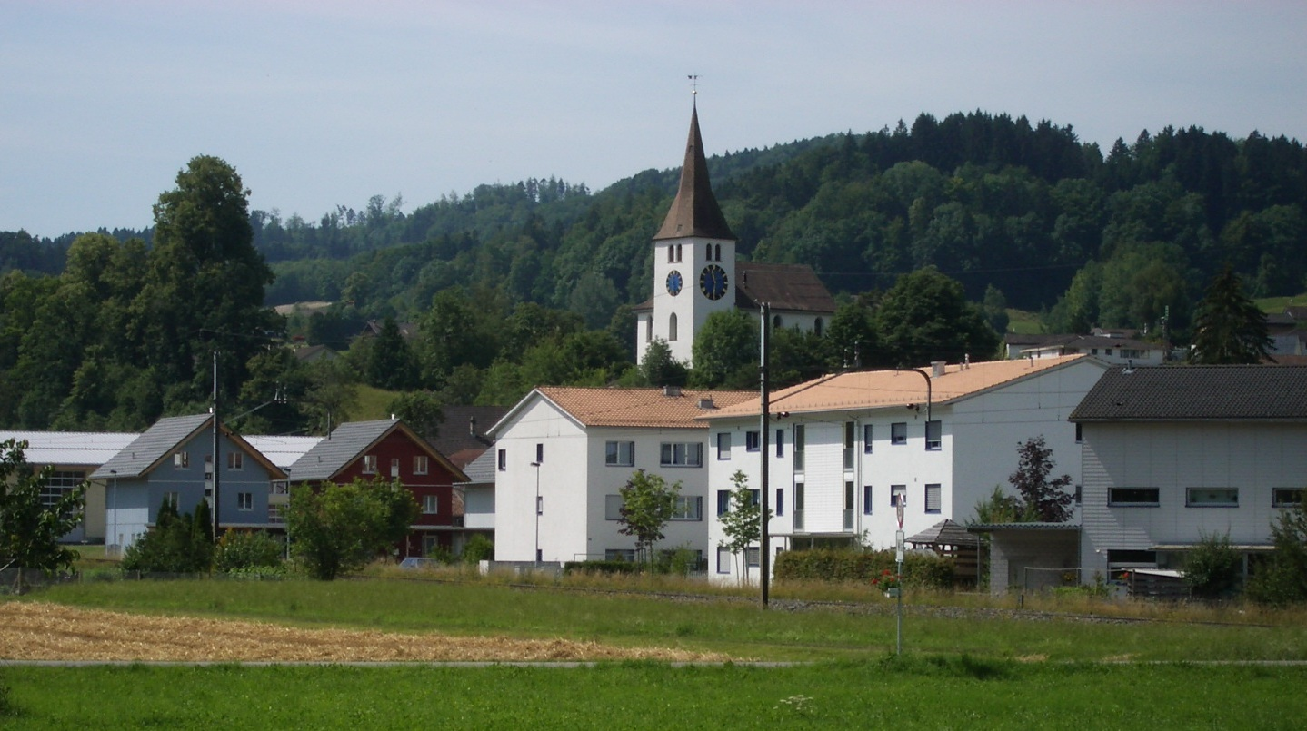 Wila ZH, Switzerland